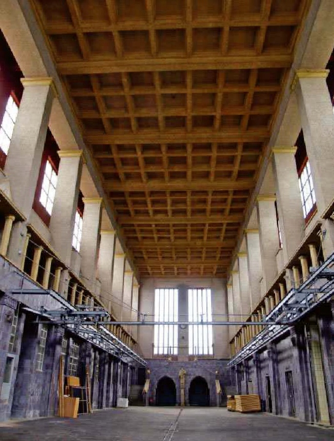 Haupthalle im Schlachthof Bad Kissingen